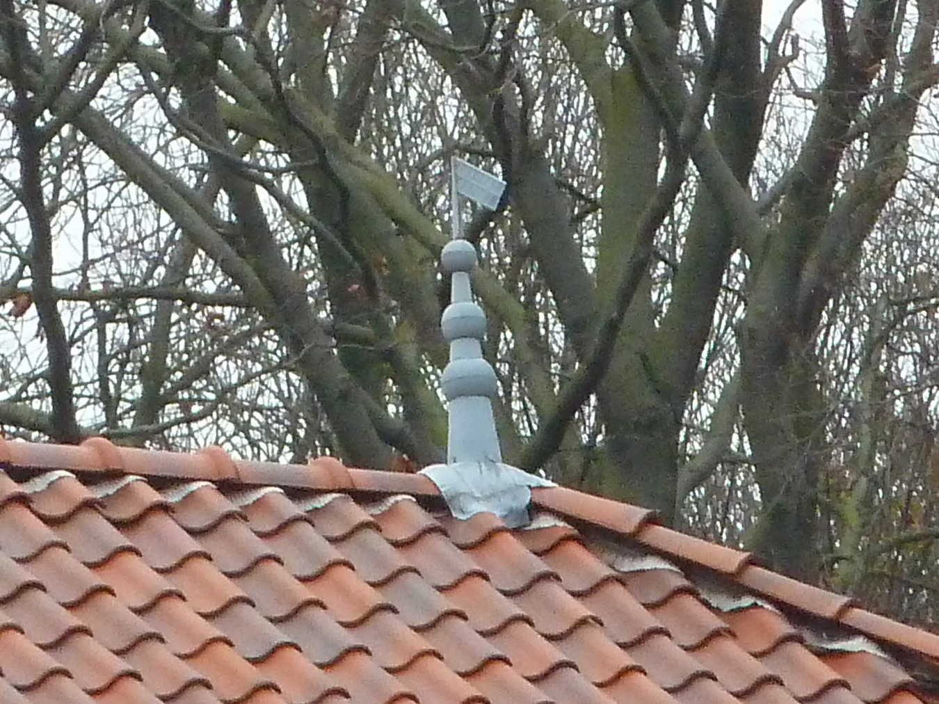 Piron op Bommerigerweg 23, Mechelen, Limburg, Nederland